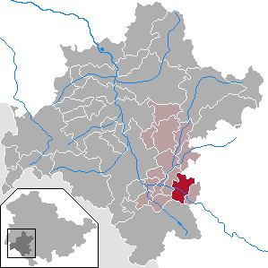 Vachdorf in Thuringia - District Schmalkalden-Meiningen